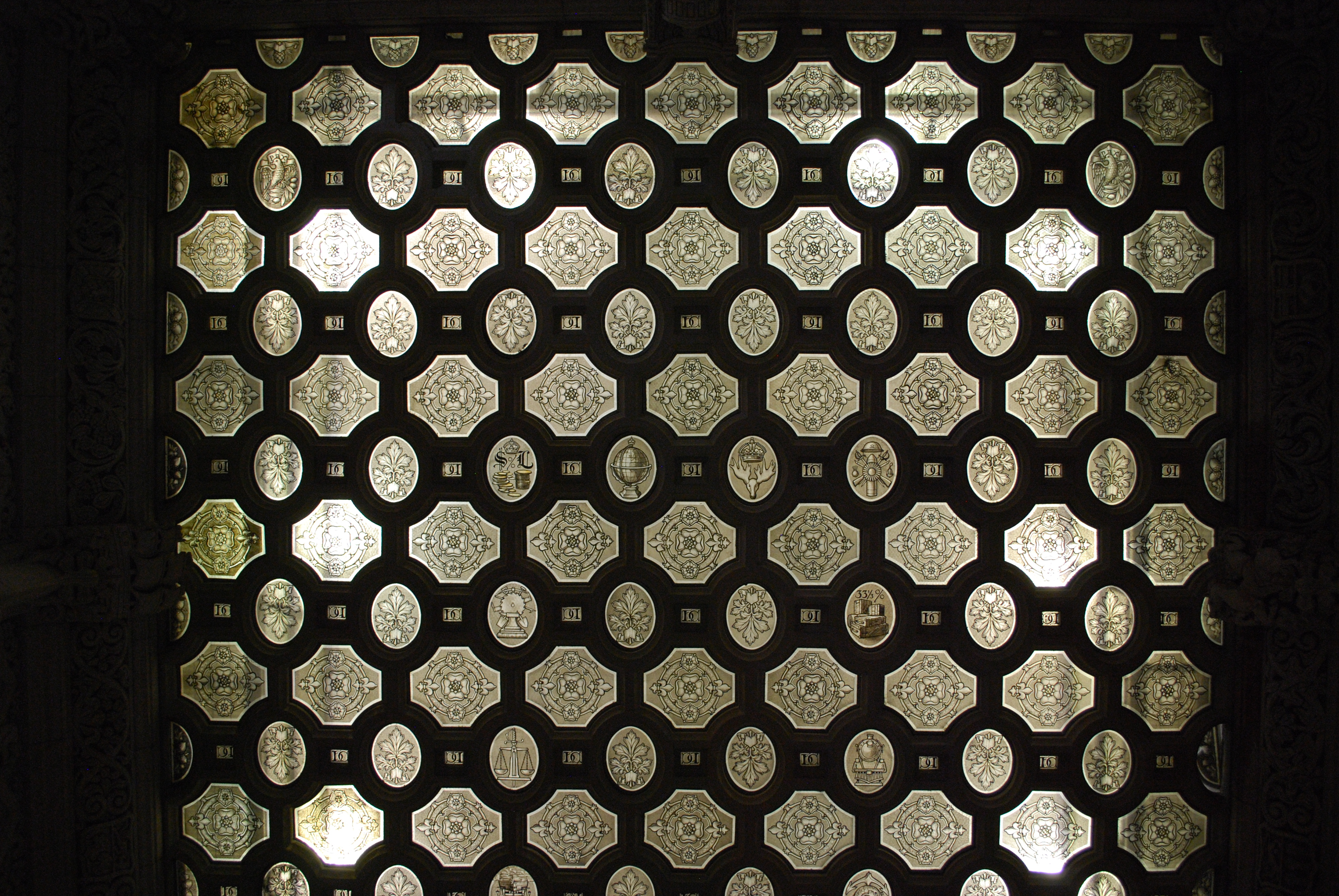 Plafond de la salle des pas perdus devant la Chambre des Communes, dans l'édifice du Centre sur la Colline du Parlement à Ottawa